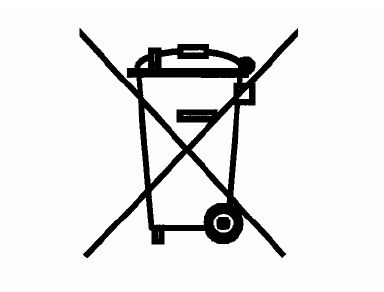 Znak przekreślonego kosza ZSEE